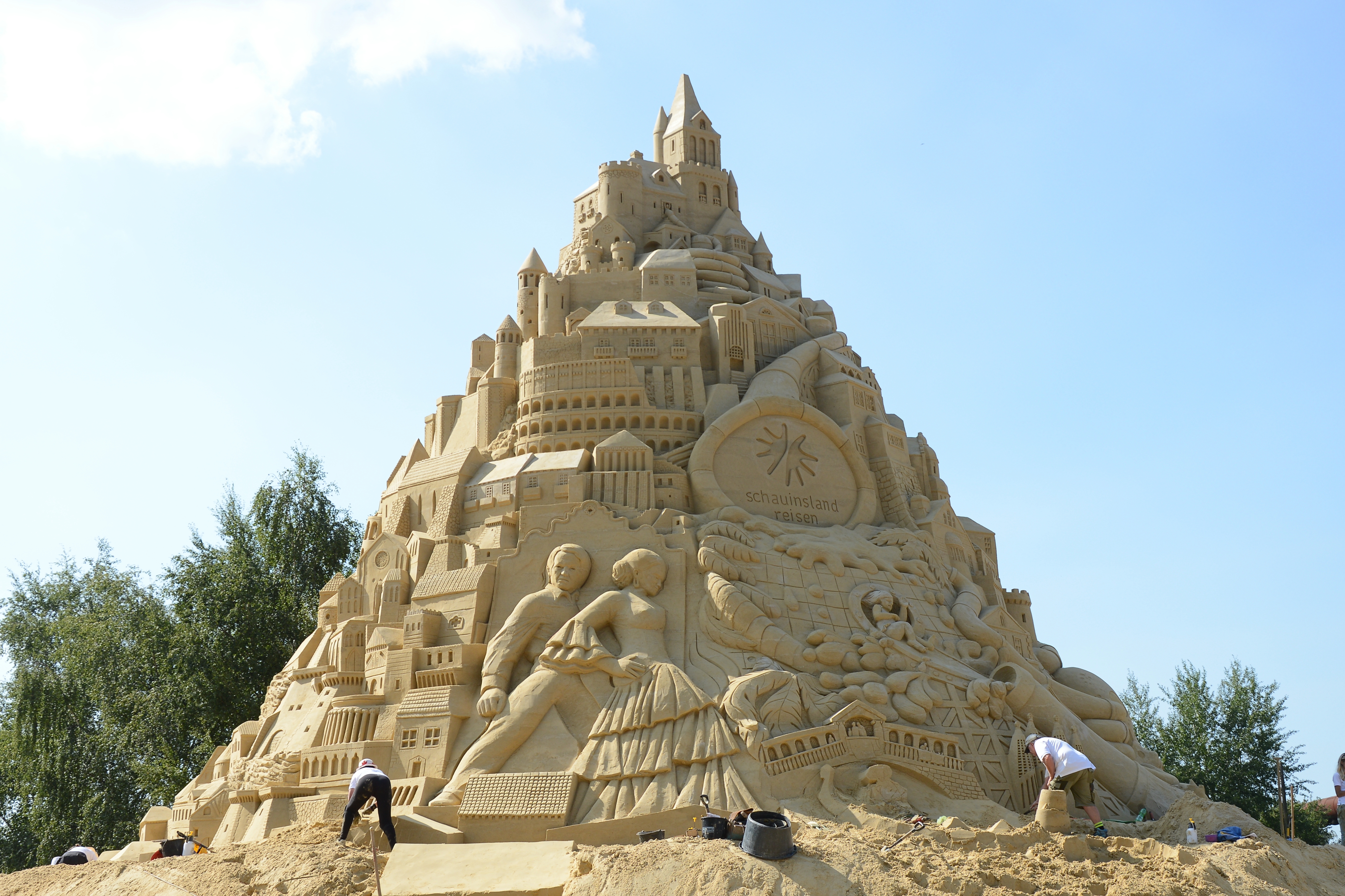 Sandburg Weltrekordversuch 2017 im Landschaftspark Duisburg-Nord